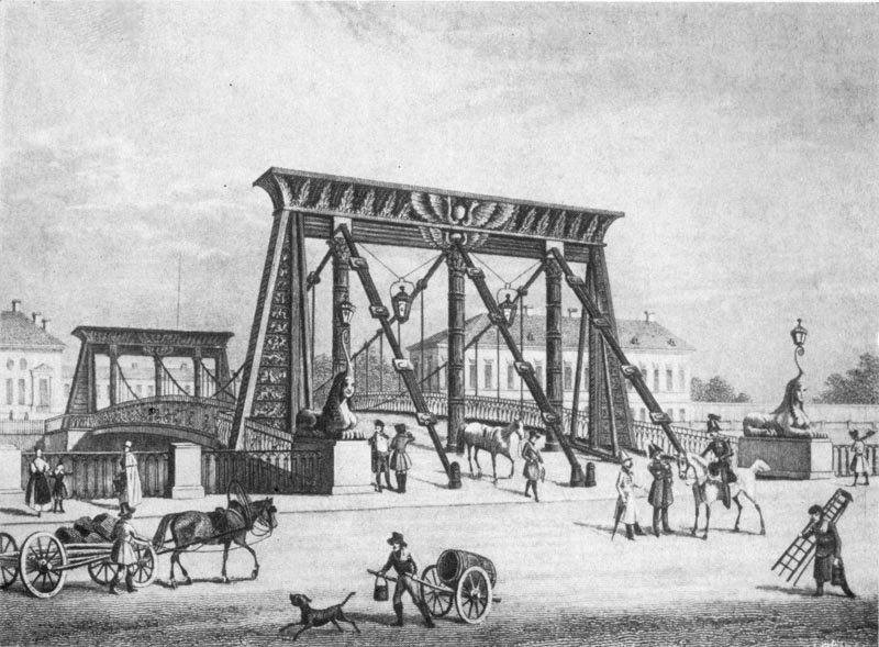 Египетский мост через Фонтанку в Санкт-Петербурге. Гравюра Поппеля. 1830-е гг.